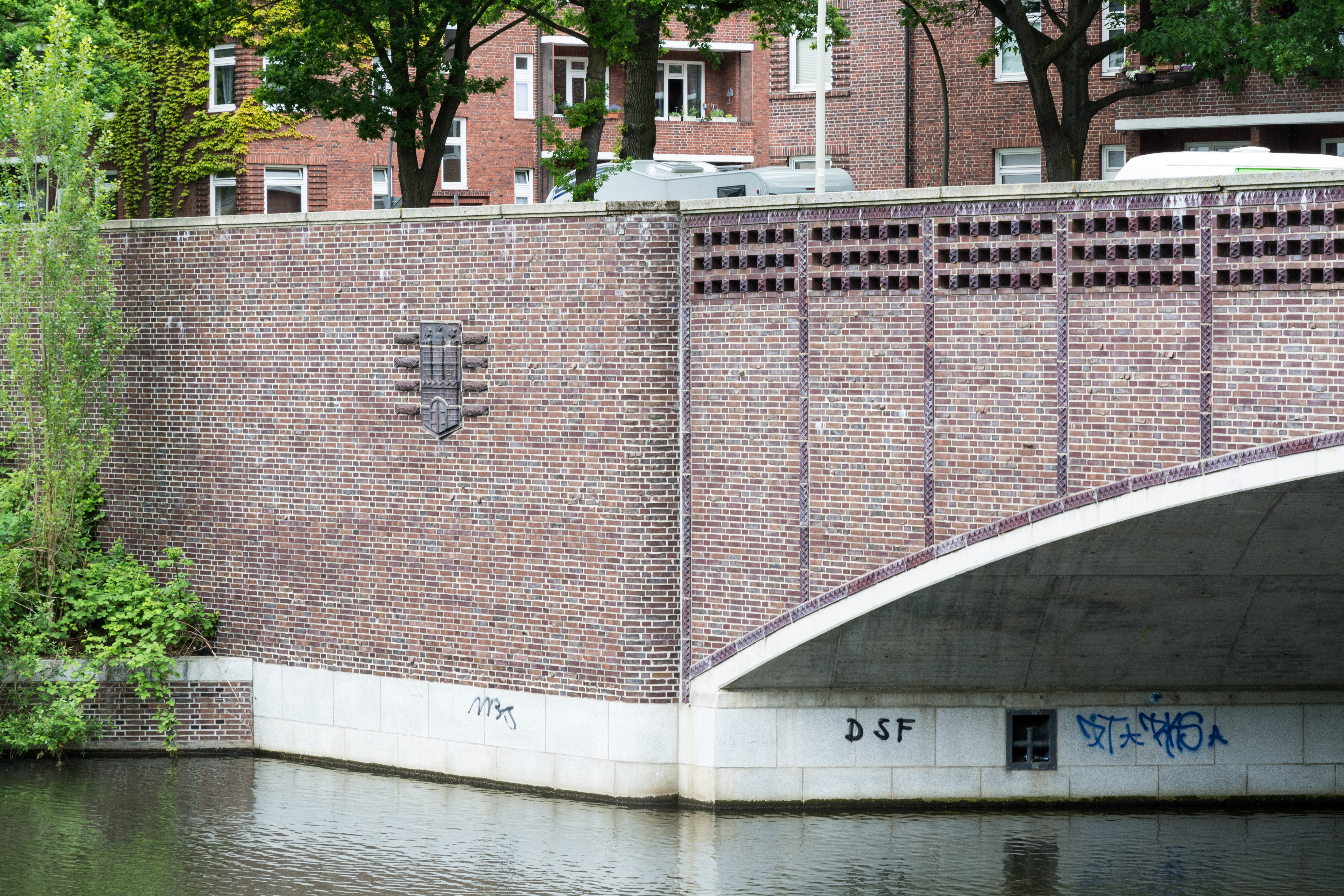 Detailaufnahme der Wiesendammbrücke über den Goldbekkanal in Hamburg-Winterhude. This is a photograph of an architectural monument.